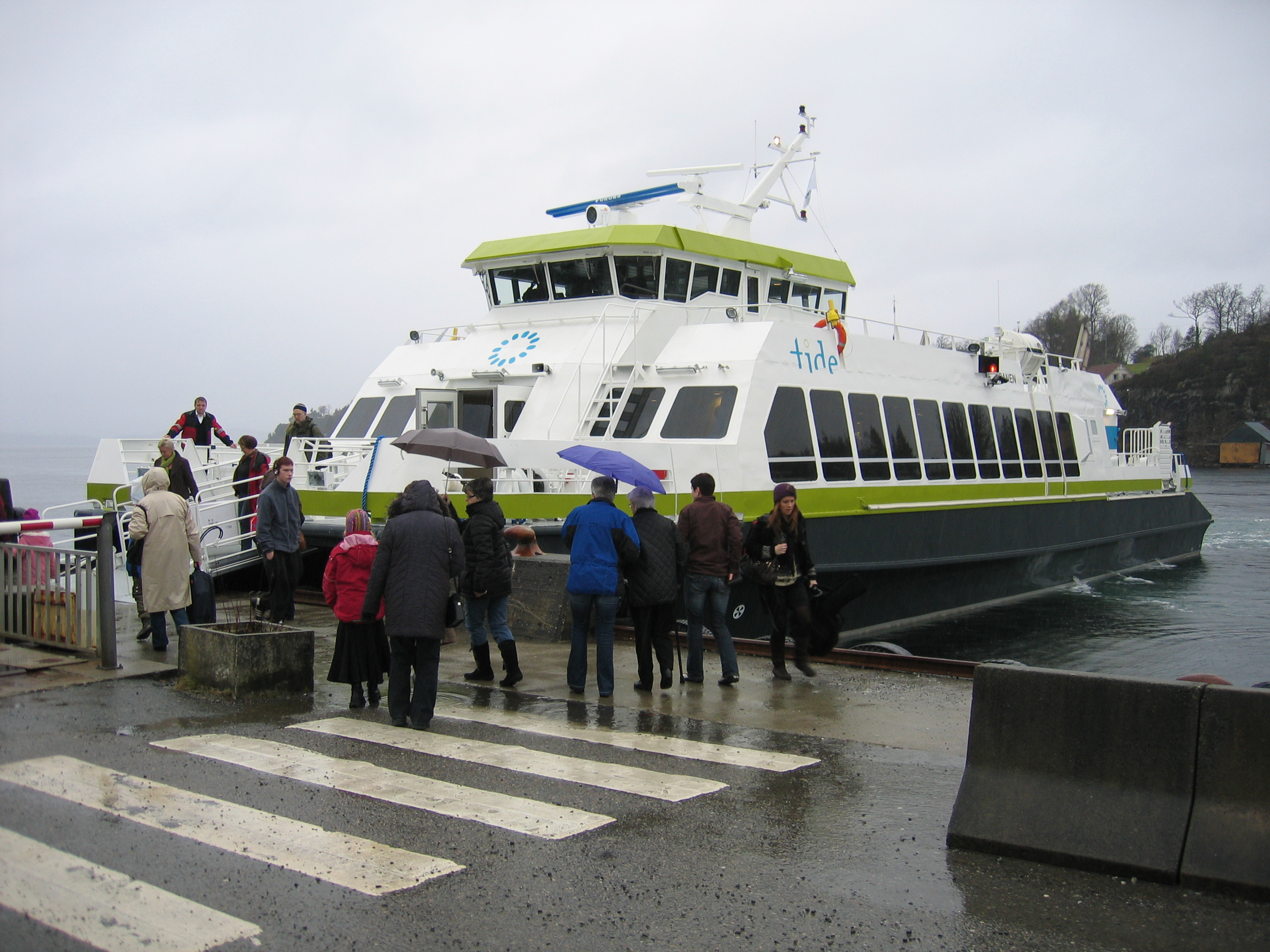 MS Tranen ved Sunde i Kvinnherad i 2007. Foto Harald Sætre